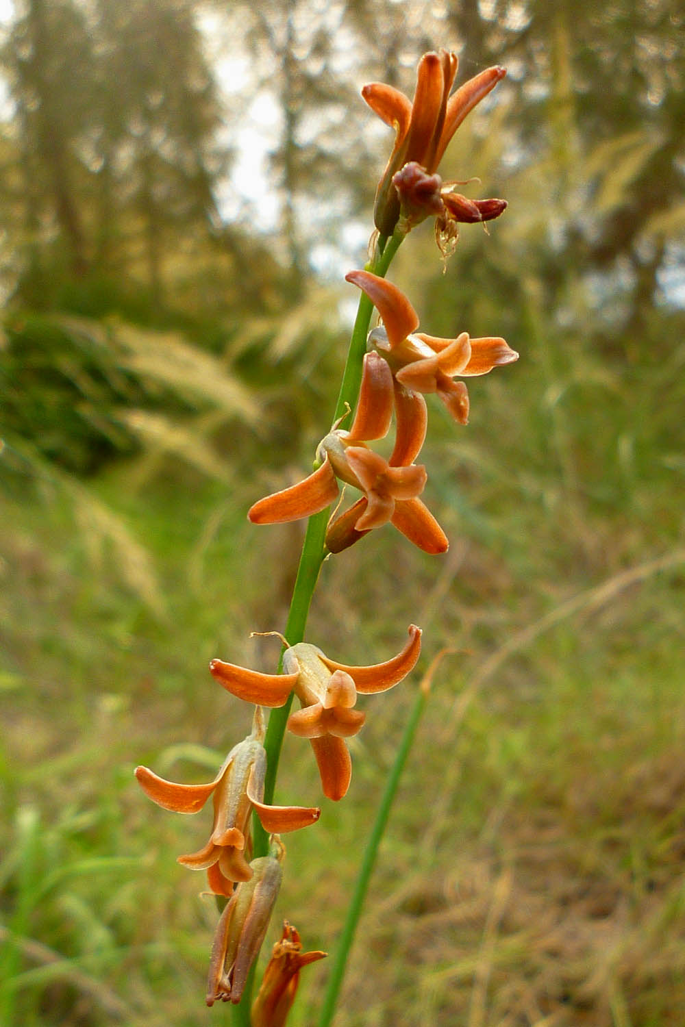 Dipcadi serotinum en Atamaría, Cartagena, España.